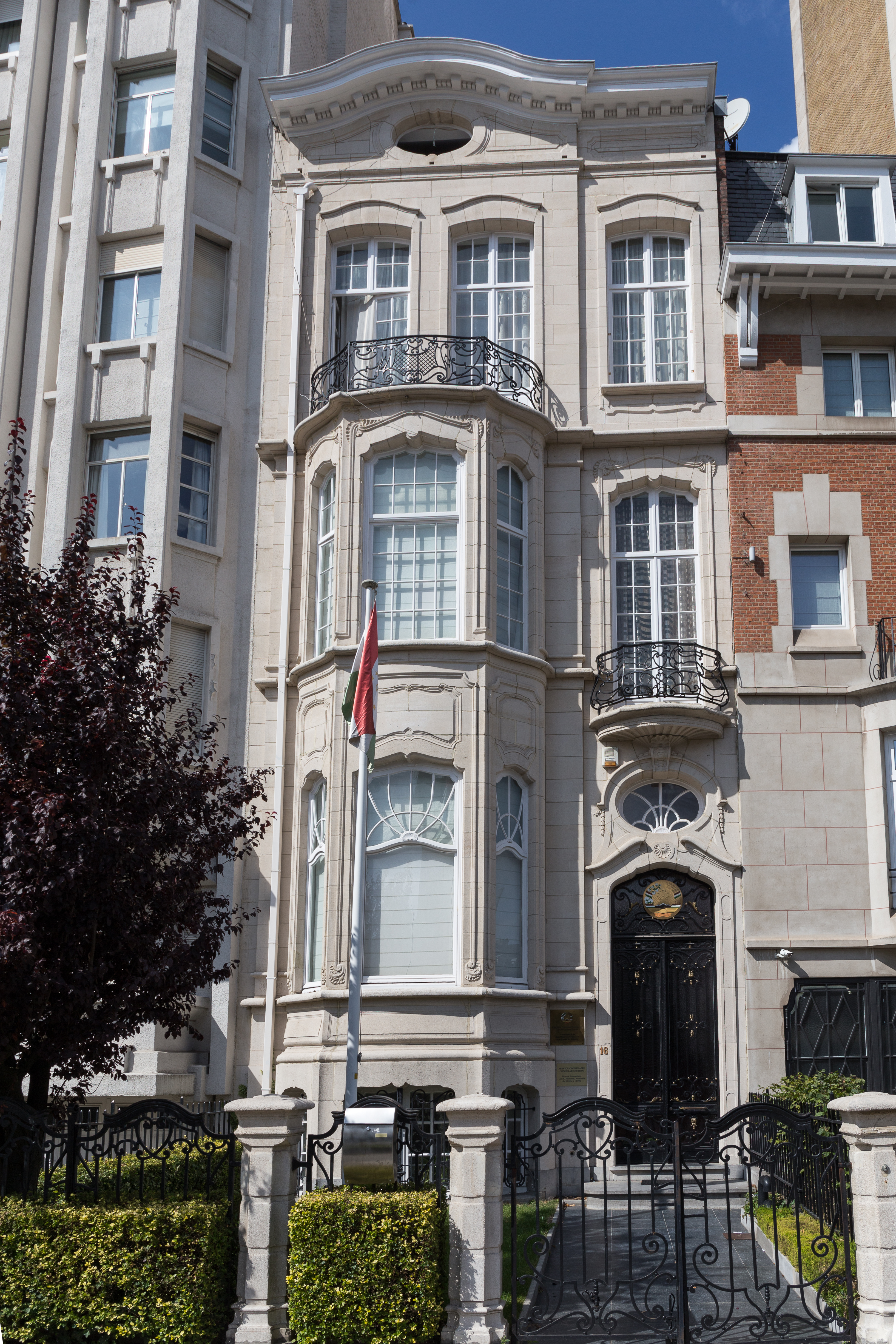 Ambassade du Tadjikistan en Belgique, boulevard Général Jacques 16 à Ixelles.